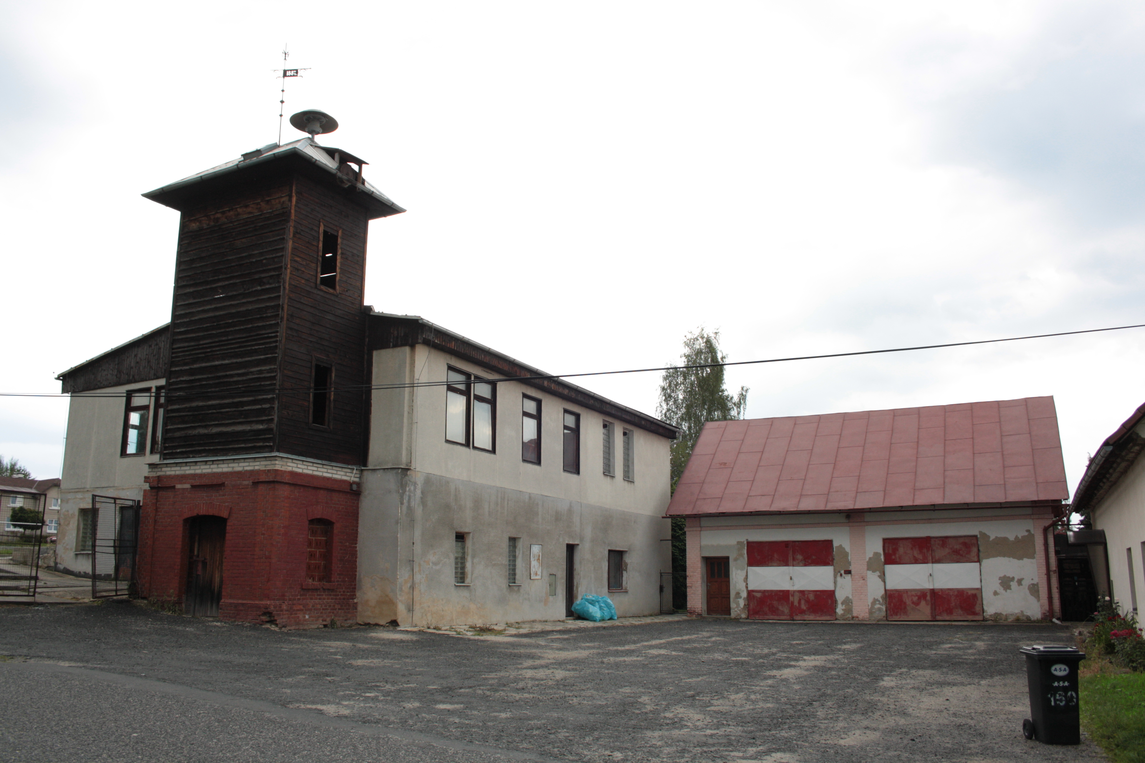 This photograph was taken with a DSLR from WMCZ's Camera grant. Hasičská zbrojnice v Kunraticích poblíž Frýdlantu v okrese Liberec.